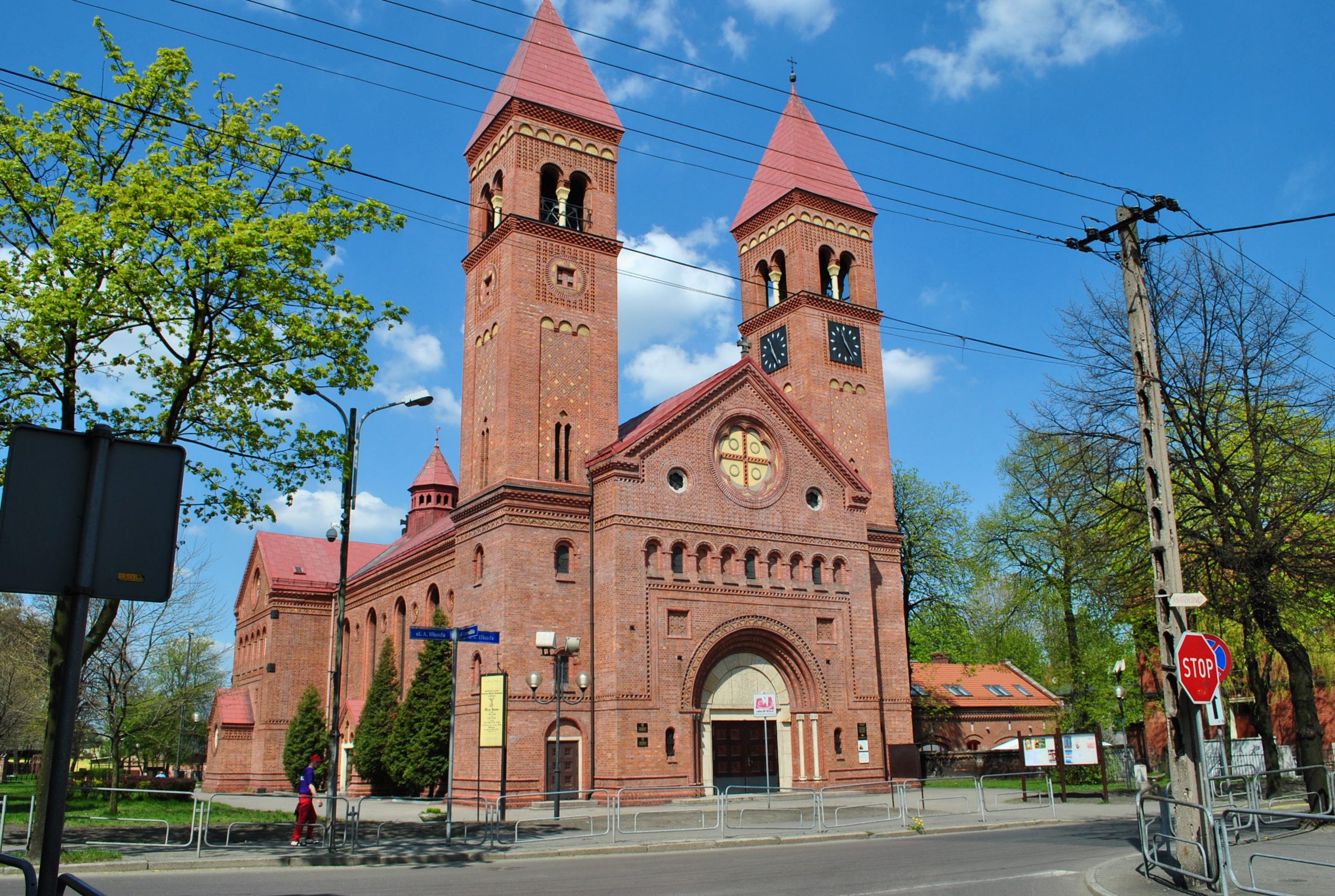 Ruda Śląska - Orzegów. Parafia św. Michała Archanioła